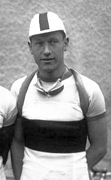 Jules Rossi, Paris-Evreux